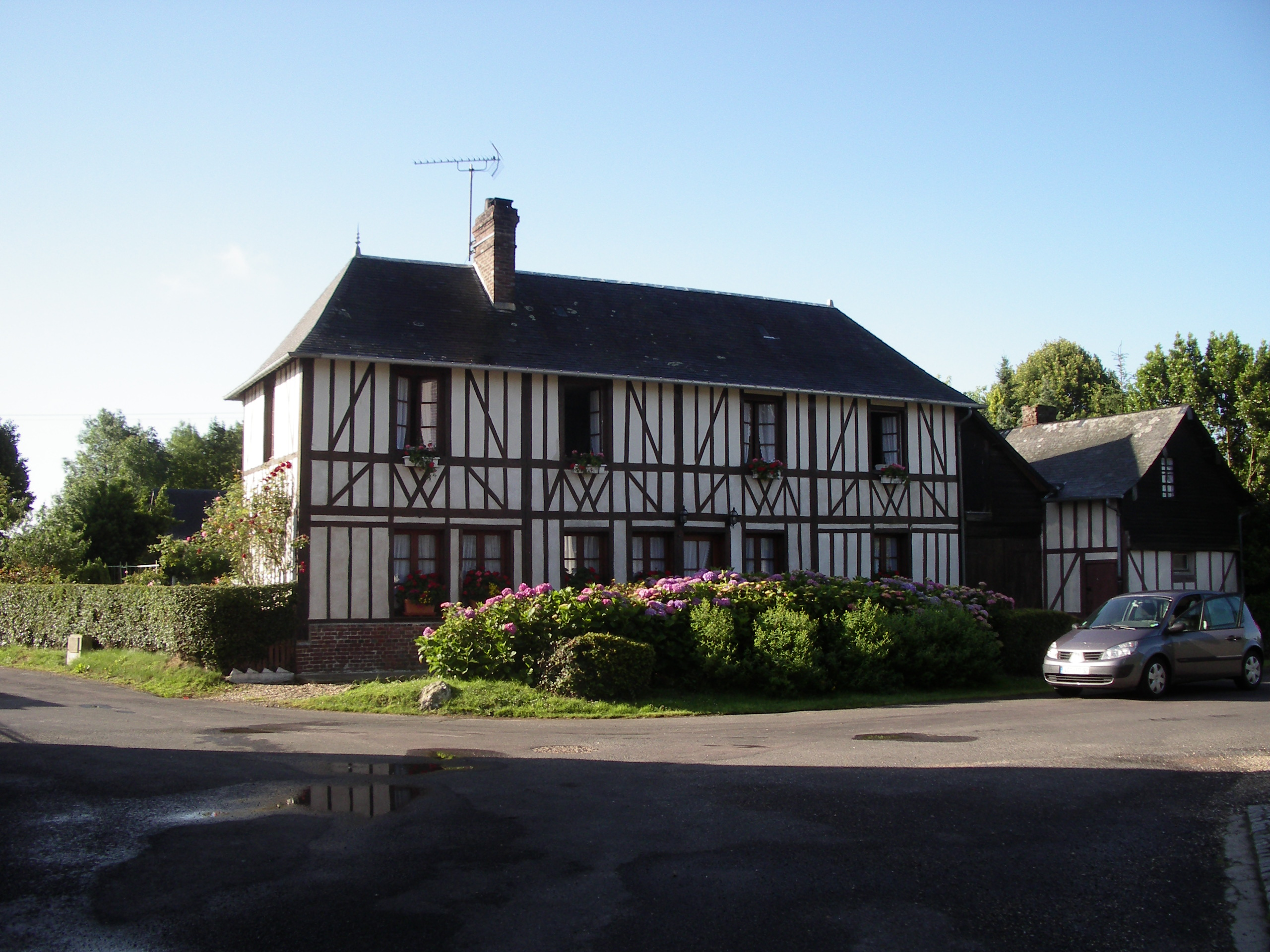 sur la place de Saint-Étienne-l'Allier